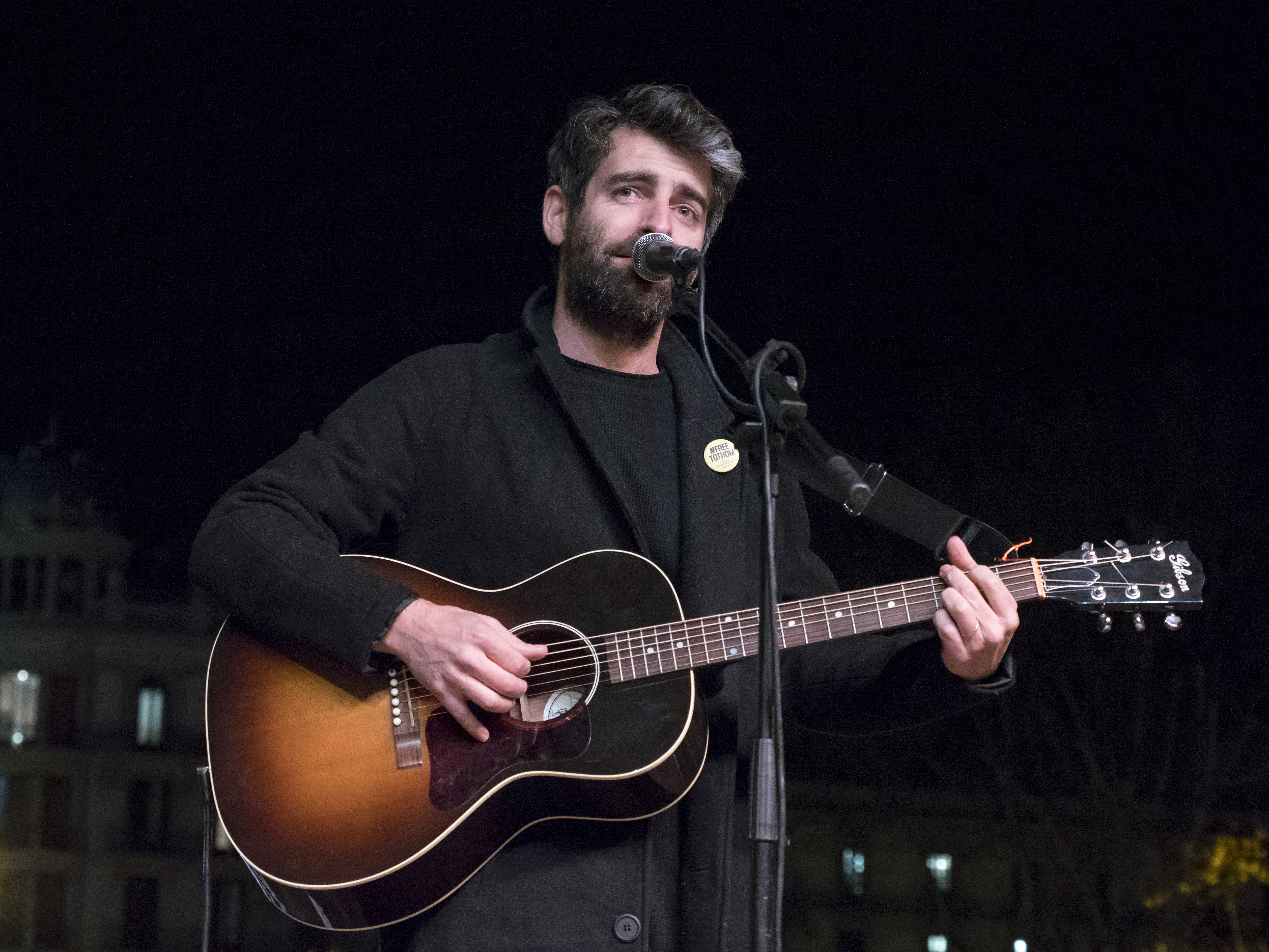 OLYMPUS DIGITAL CAMERA Milers de persones han omplert places i carrers del país aquest dimarts al vespre, primer dia del Judici a la Democràcia, sota el clam de ‘L’autodeterminació no és delicte’. A Barcelona, l’epicentre de la protesta al vespre ha estat plaça Catalunya. Entitats de la societat civil, com Òmnium, l’ANC, Unió de Pagesos o Irídia, entre d’altres, activistes com David Fernández i portaveus de diferents formacions polítiques han llegit un text unitari on es deixa clar que “mobilitzar-se i organitzar un referèndum no és delicte”, ni tampoc votar ni decidir.